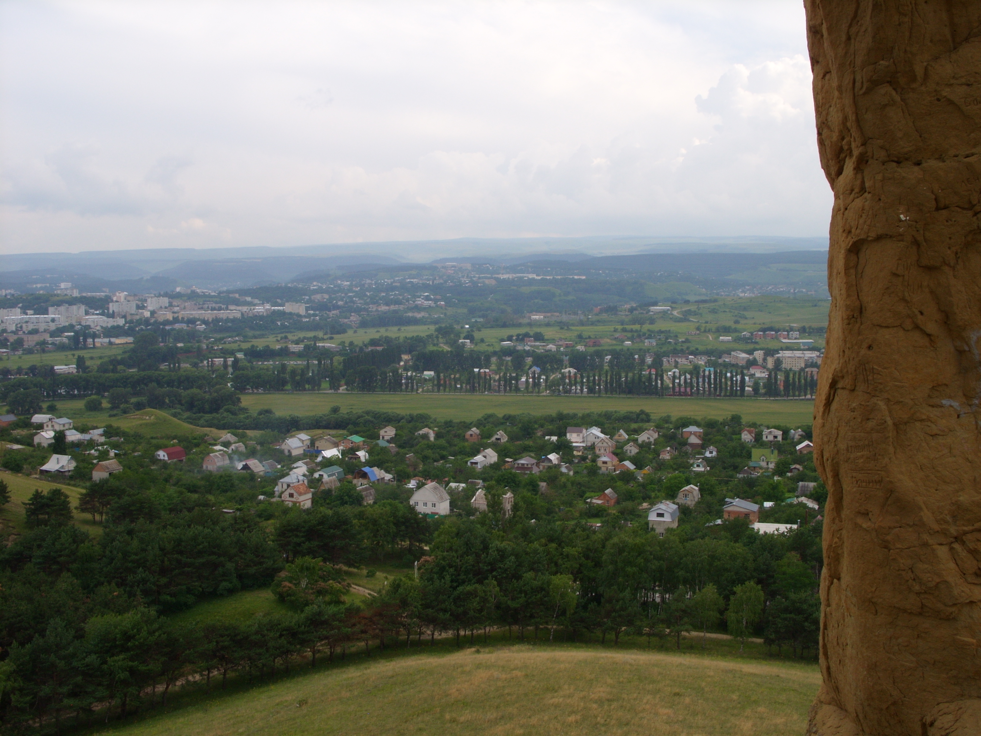 вблизи г. Кисловодска